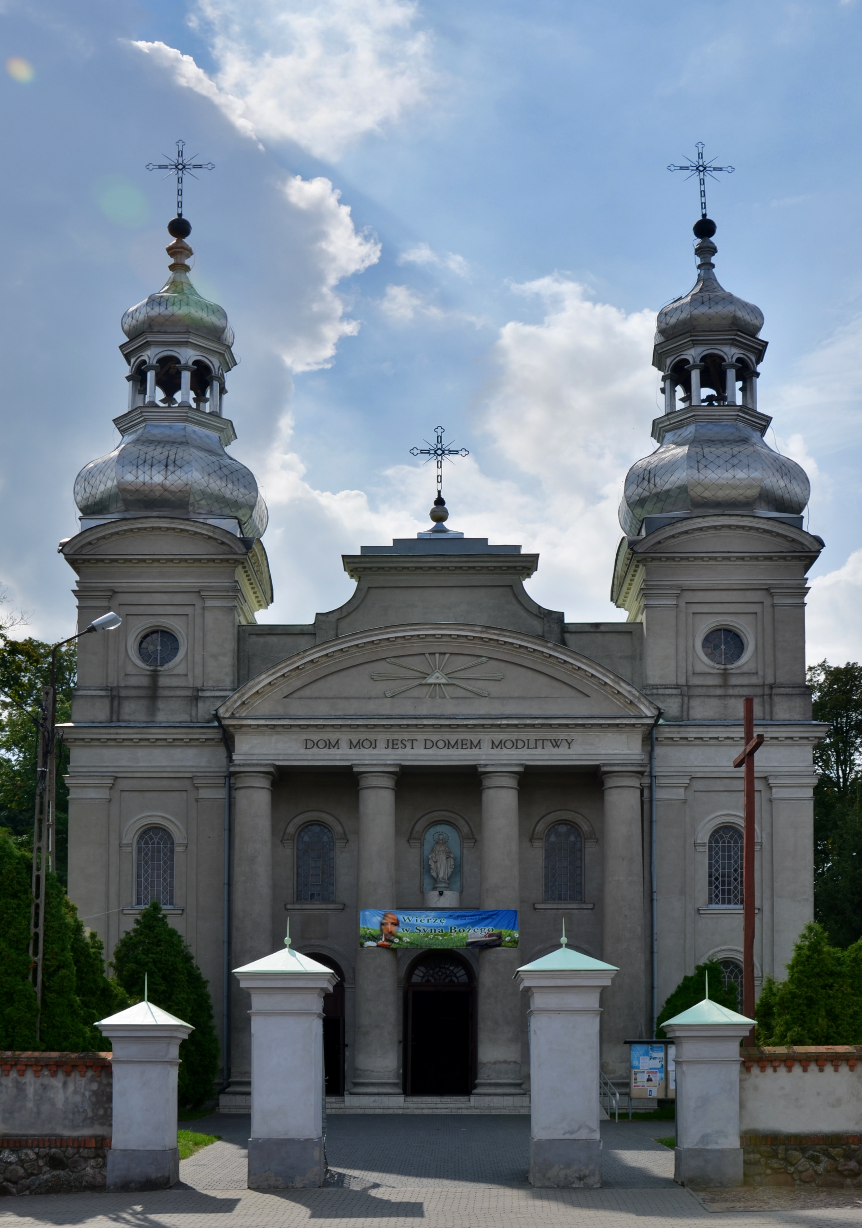 Skrwilno, kościół par. pw. św. Anny, 1852, 1888-1894